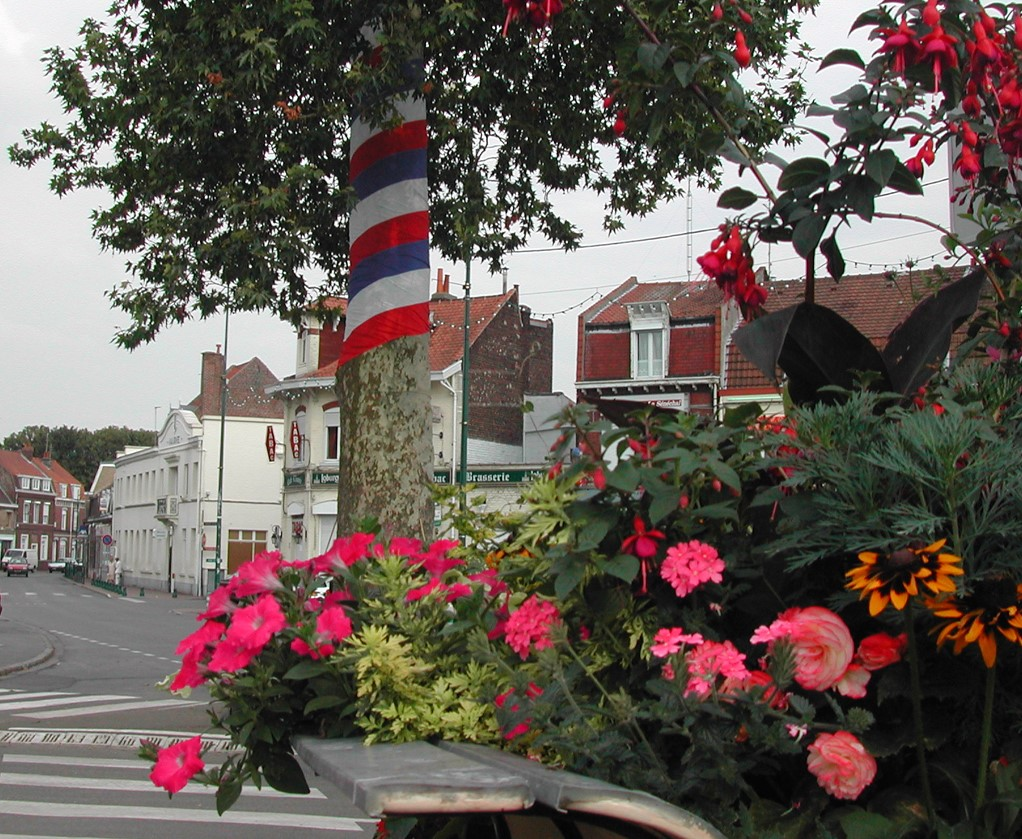 l'« Arbre de la Liberté », un platane d'Orient a été planté en 1848 sur la place du village pour fêter l'avènement de la Seconde République Villeneuve-d'Ascq, France